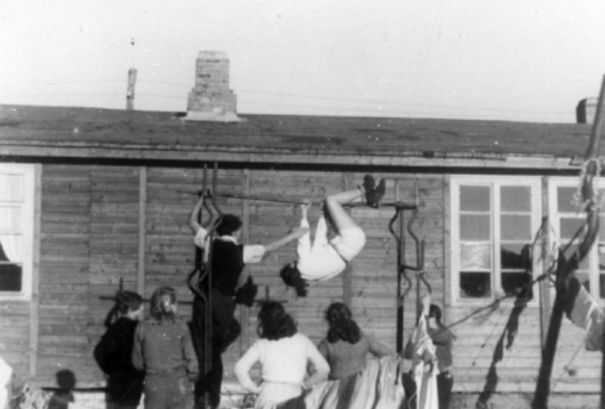 פלי"ם ספינות המעפילים ג - אקסודוס - ספינות המעפילים – אקסודוס יציאת אירופה תשז - למרות הקשיחות הבריטית והלחץ על המעפילים לעבור לצרפת, או לחזור לארצות מוצאם, התארגנו המחנות בניהול עצמי. מיד הוקמו בתי ספר וחוגים לתרבות ולספורט. אימוני פלמ"ח באחד המחנות.